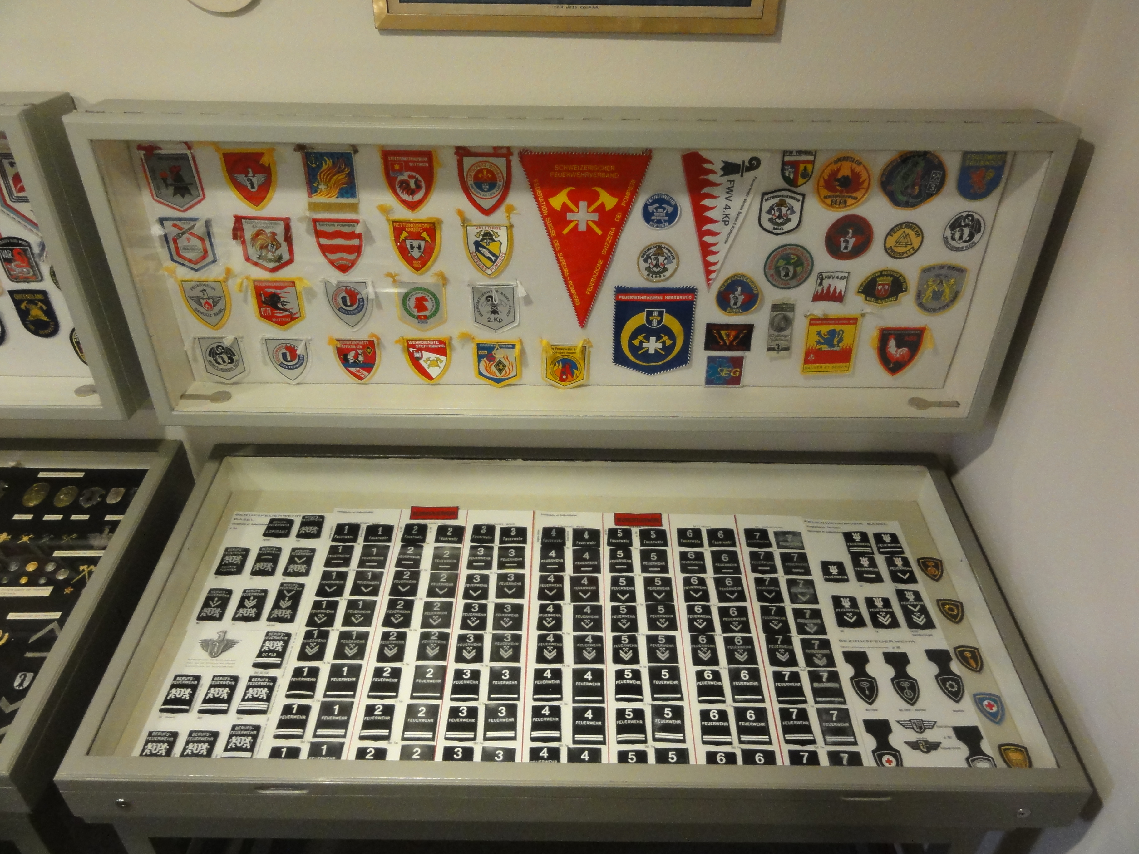 Basel — Schweizerisches Feuerwehrmuseum Basel-Stadt